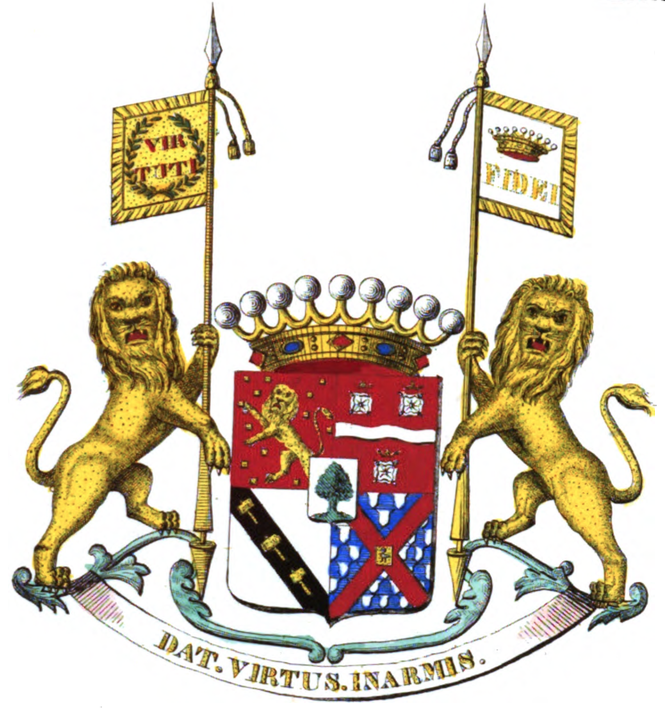 Armoiries de la famille des Enffans